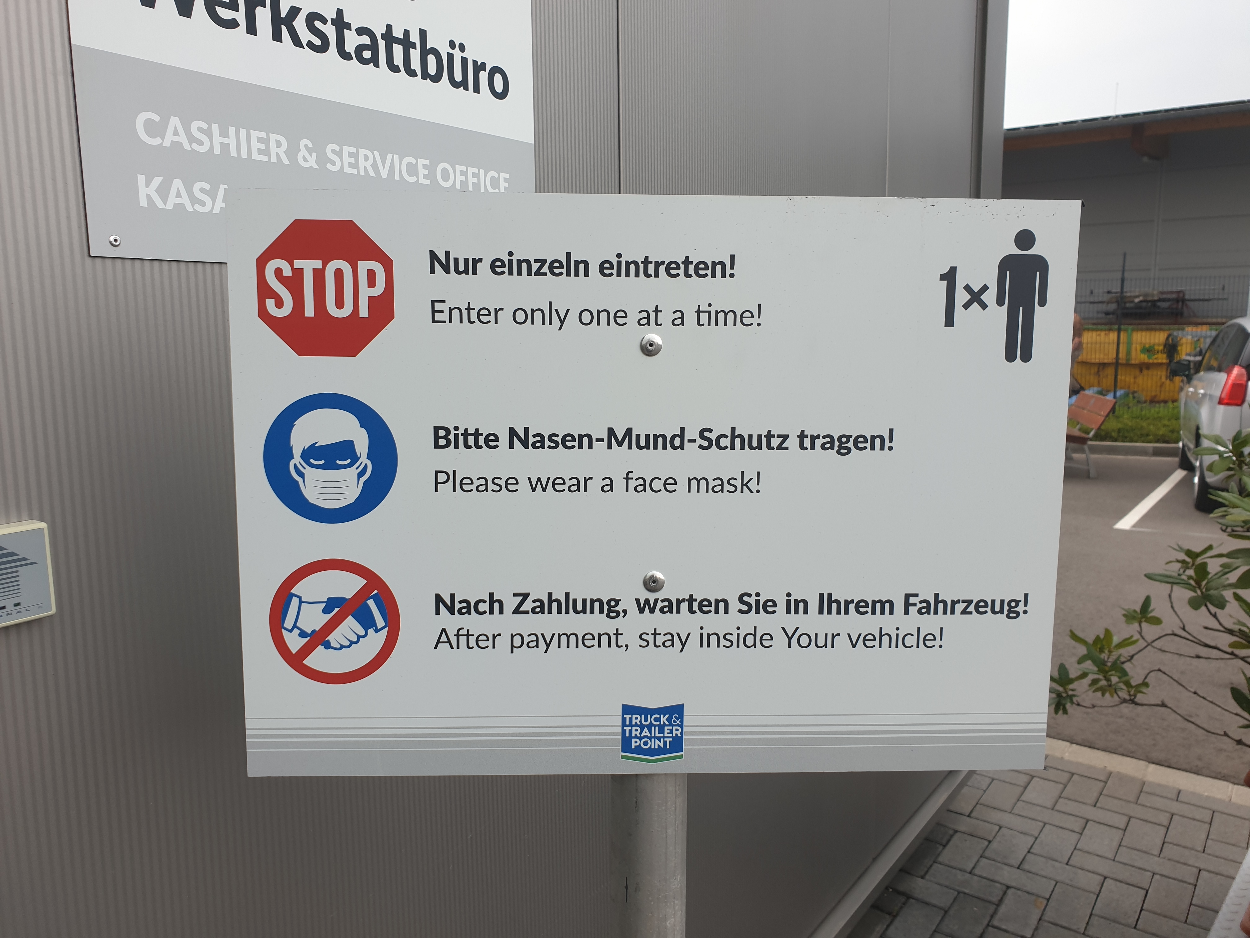 Hinweisschild zu Maßnahmen im Zuge der Covid-19-Pandemie für Kunden einer Nutzfahrzeuganlage mit Waschhalle.